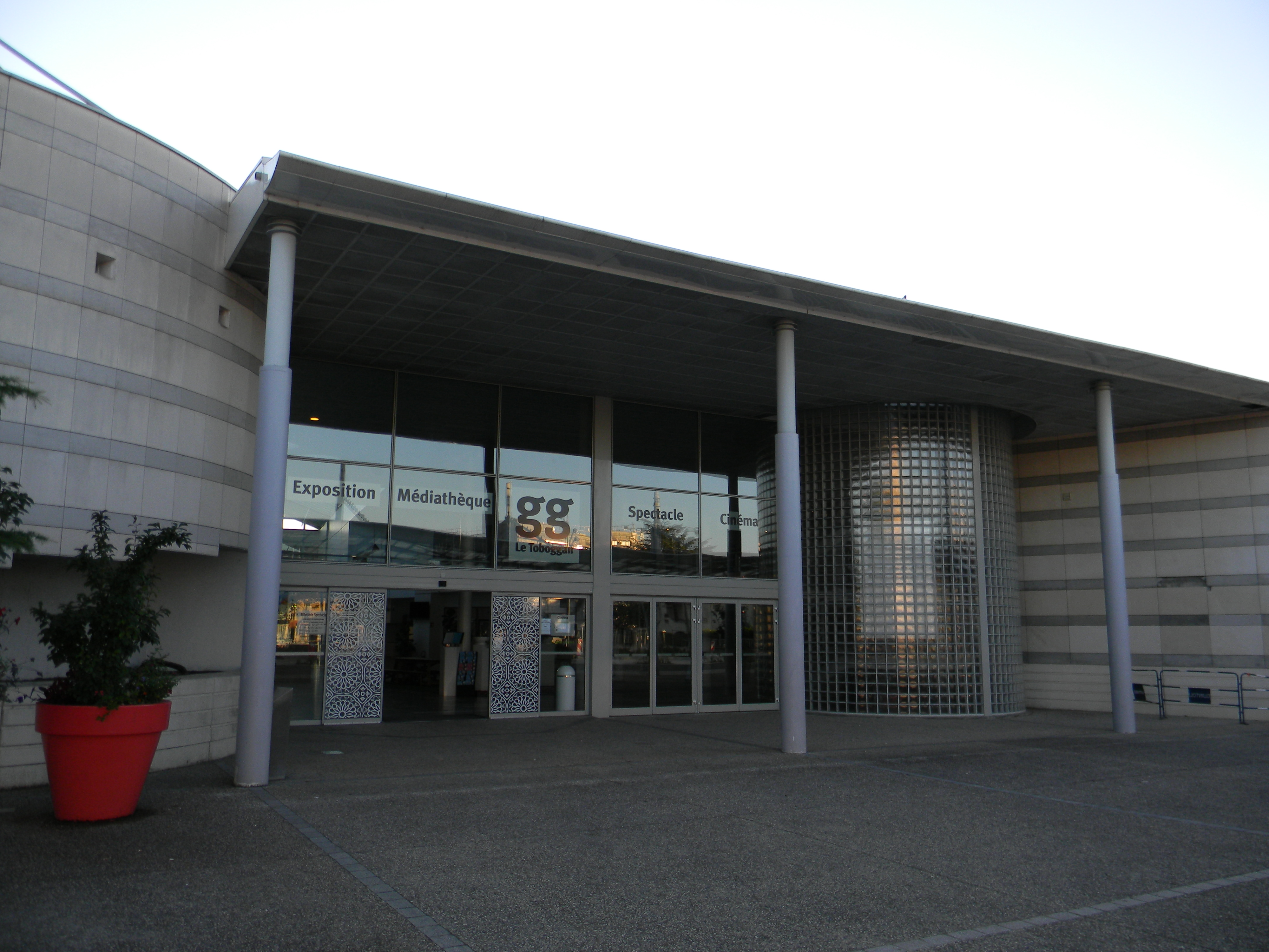 Le Toboggan, salle d'exposition, médiathèque, salle de spectacle et cinéma de Décines-Charpieu.